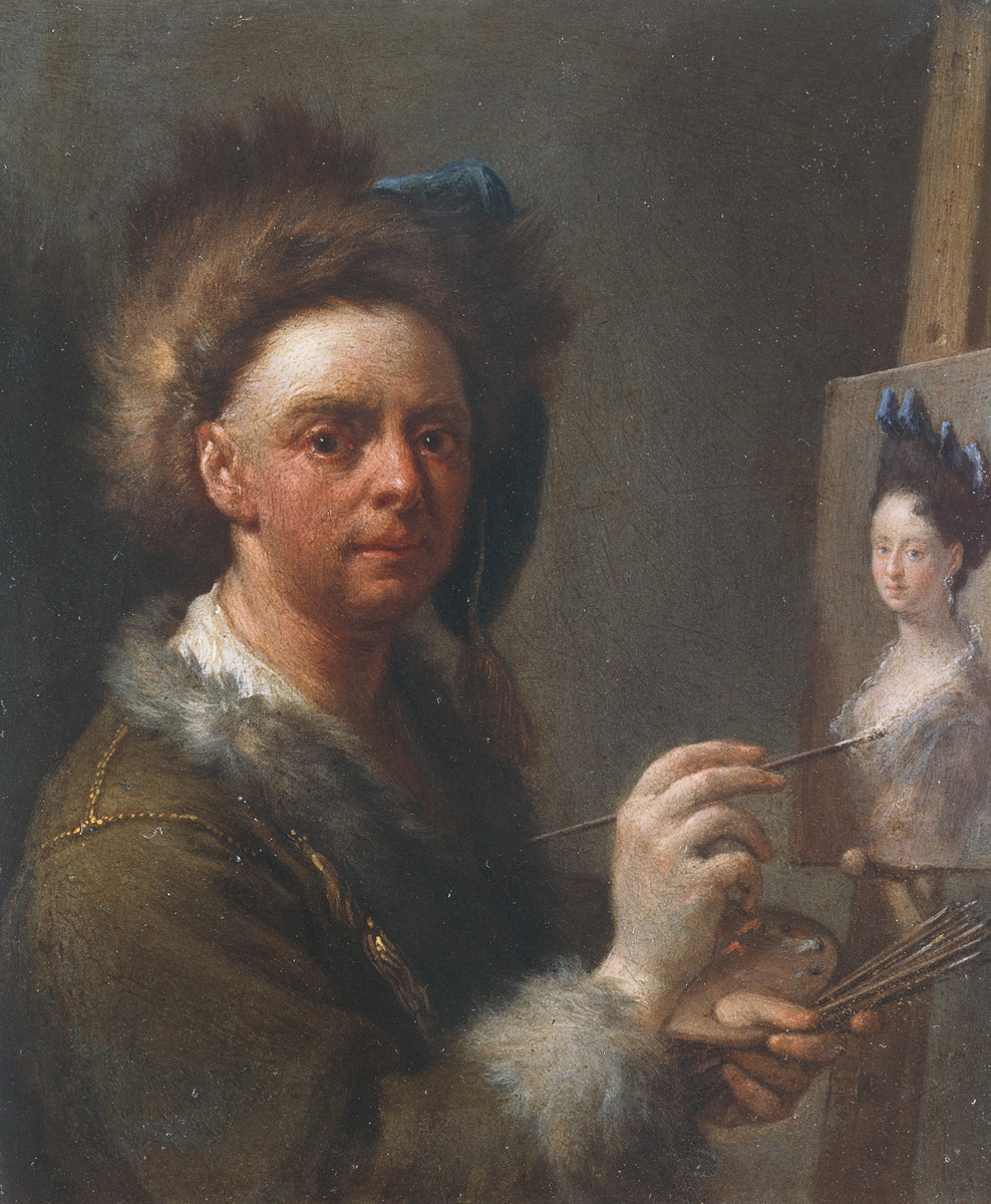 Autoportrait